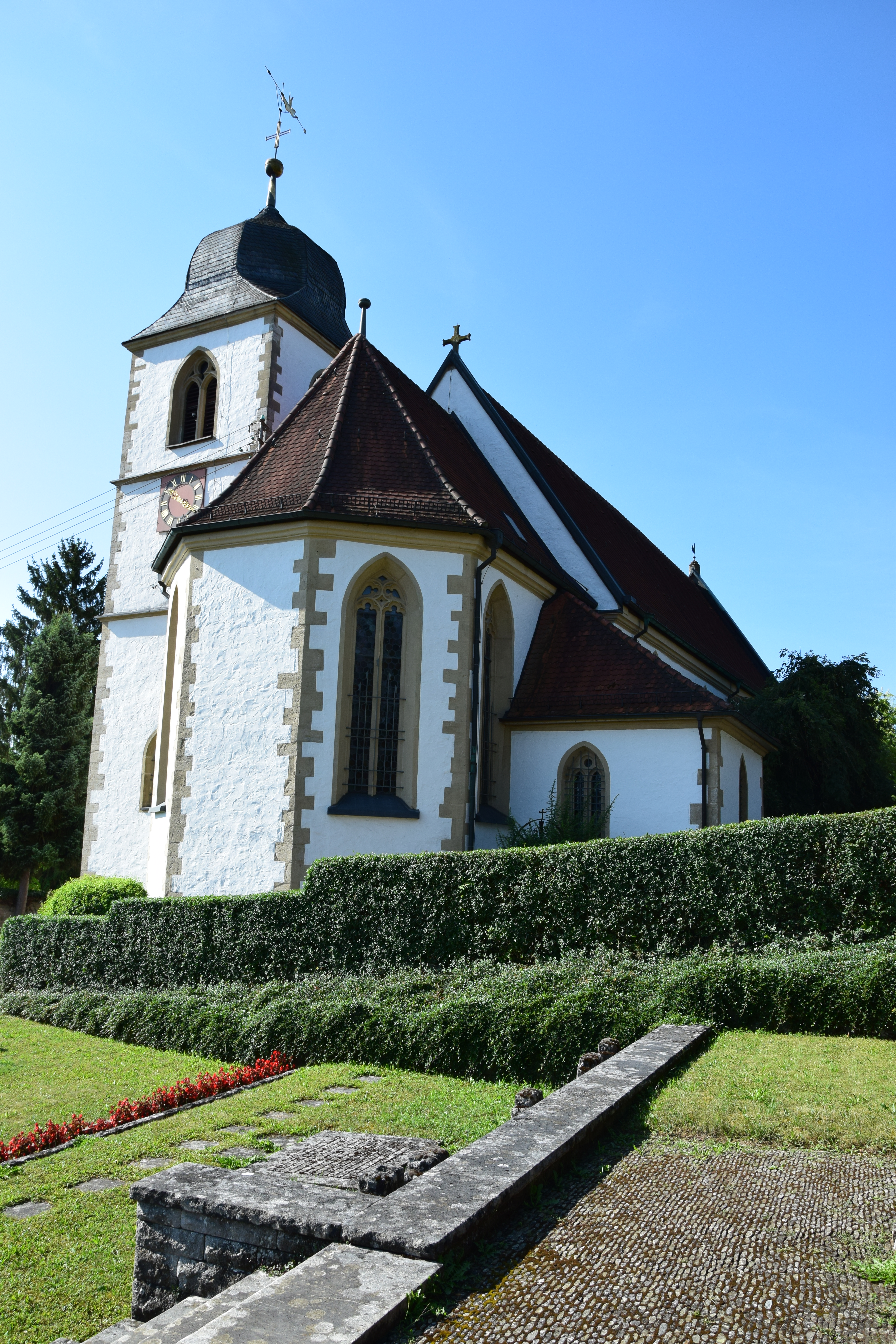 Kirche Mariä Krönung im Ortsteil Stuppach der Stadt Bad Mergentheim im Main-Tauber-Kreis, Deutschland. Im Innern der Kirche befindet sich das Gemälde "Stuppacher Madonna".